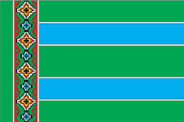 Прапор Перечинського району